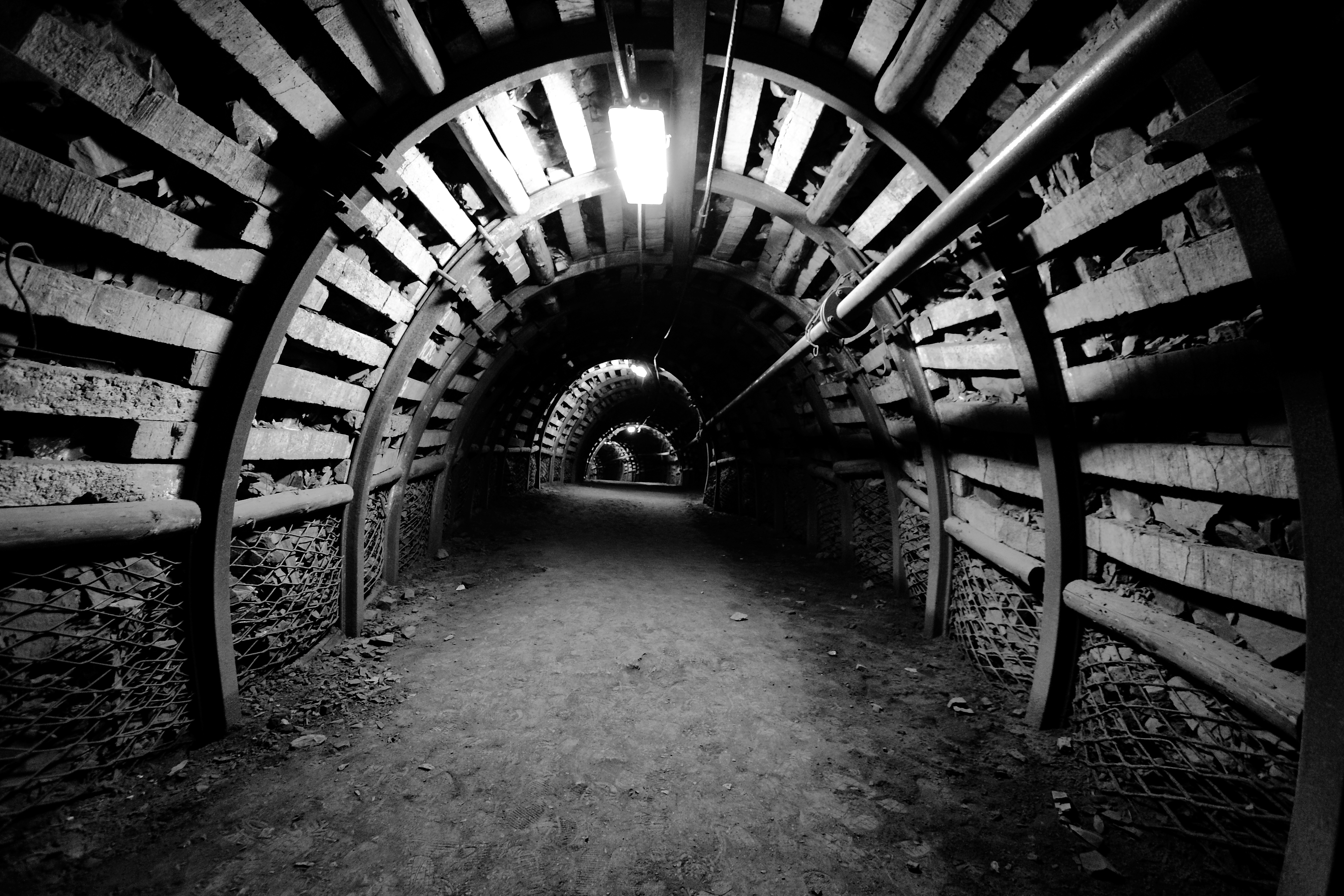 Unikatowa na skalę europejską, założona w 1855 r. kopalnia, która po zakończeniu eksploatacji pełniła funkcję węzła odwadniającego i kopalni doświadczalnej.